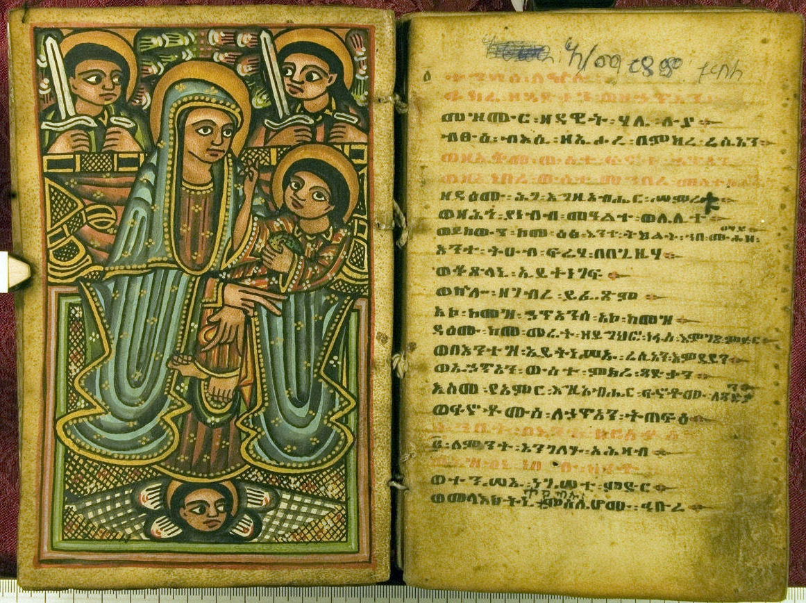 Eliza Codex 23 - Ethiopian biblical manuscript